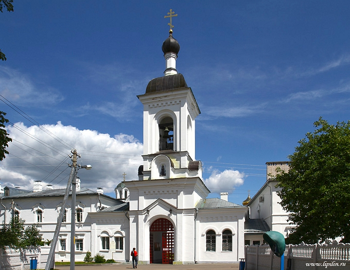 Полацк. Званіца